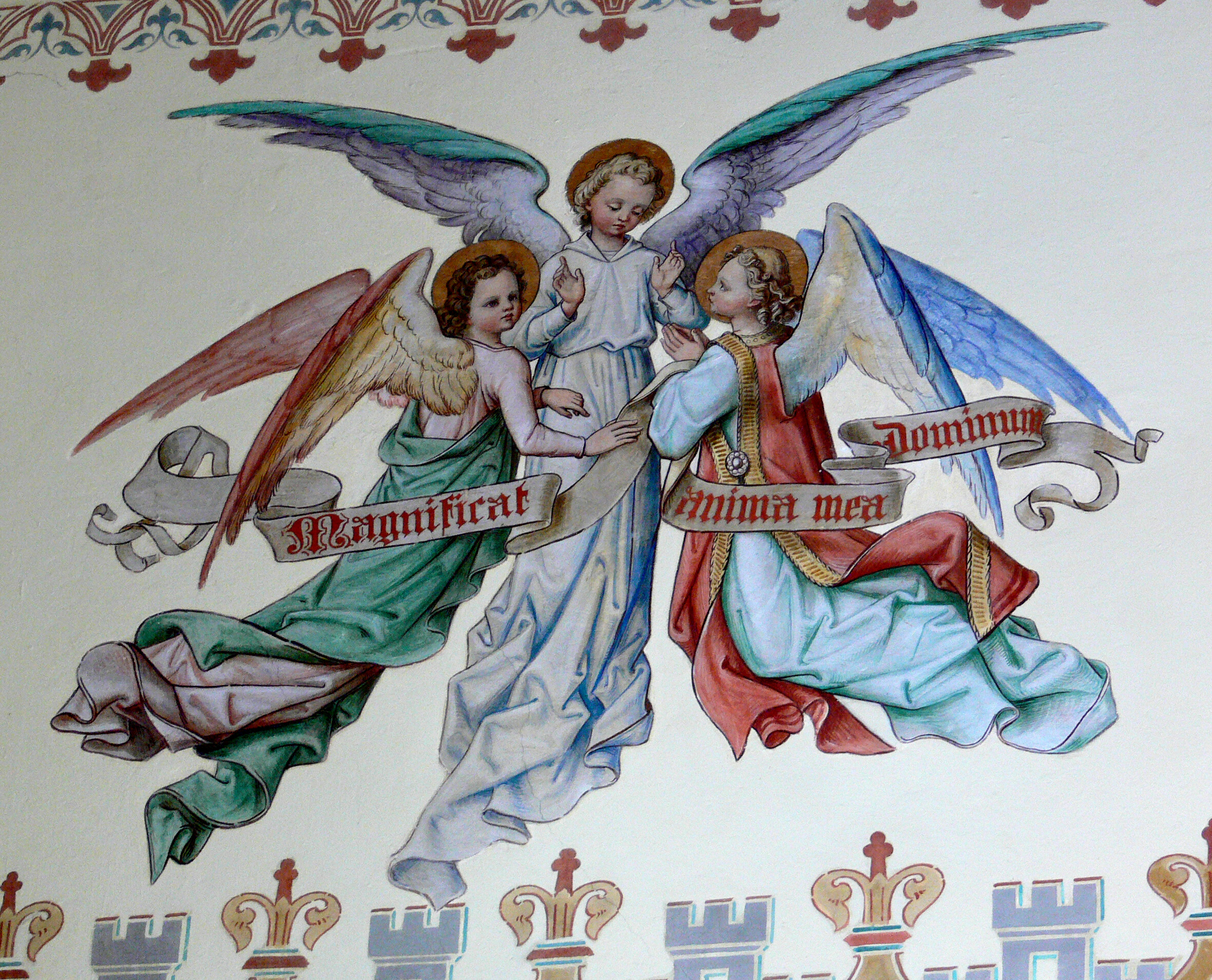 Filialkirche St. Venantius, Pfärrenbach, Gemeinde Horgenzell Wandgemälde